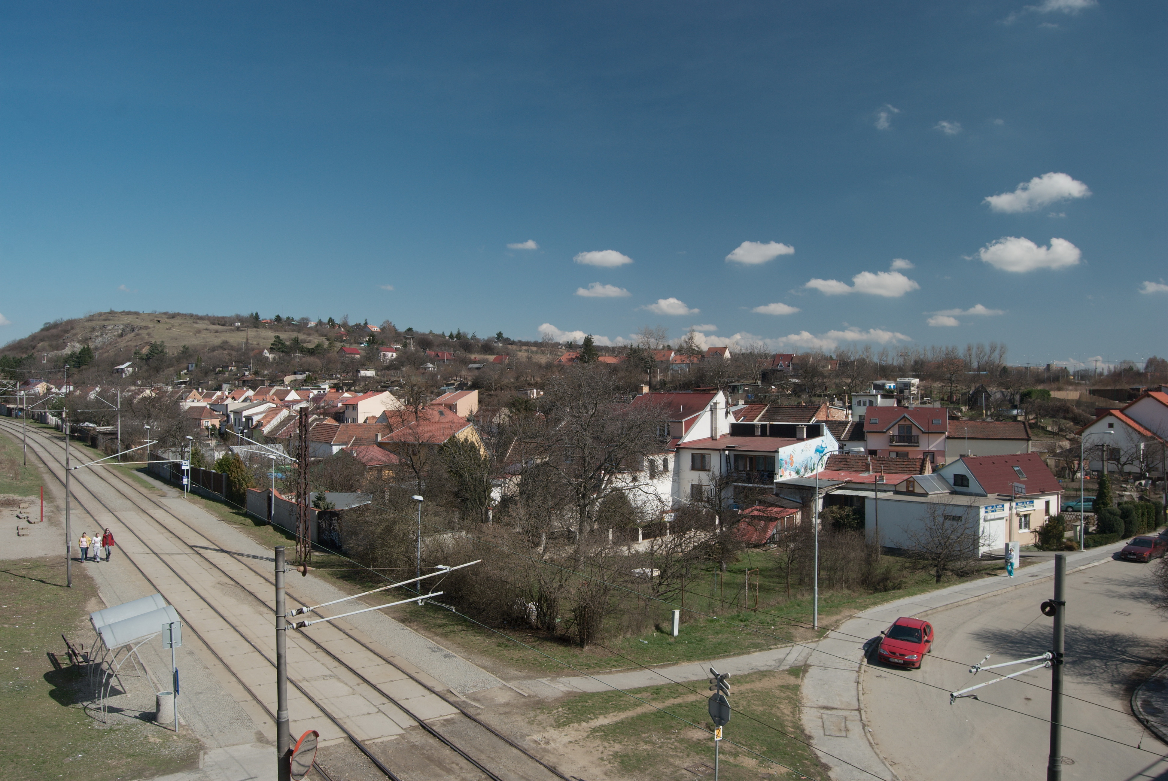 Česky: Brno-Slatina - osada Pod Stránskou skálou